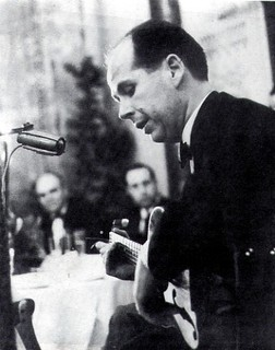 Delfí Abella, interpretant una de les seves cançons en un concert del grup